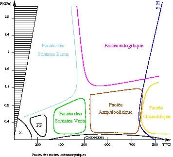 Faciès métamorphiques. Légende : Z=zéolite PP=prehnite pumpellite en hachuré, conditions non réalisées sur Terre SH=solidus hydraté